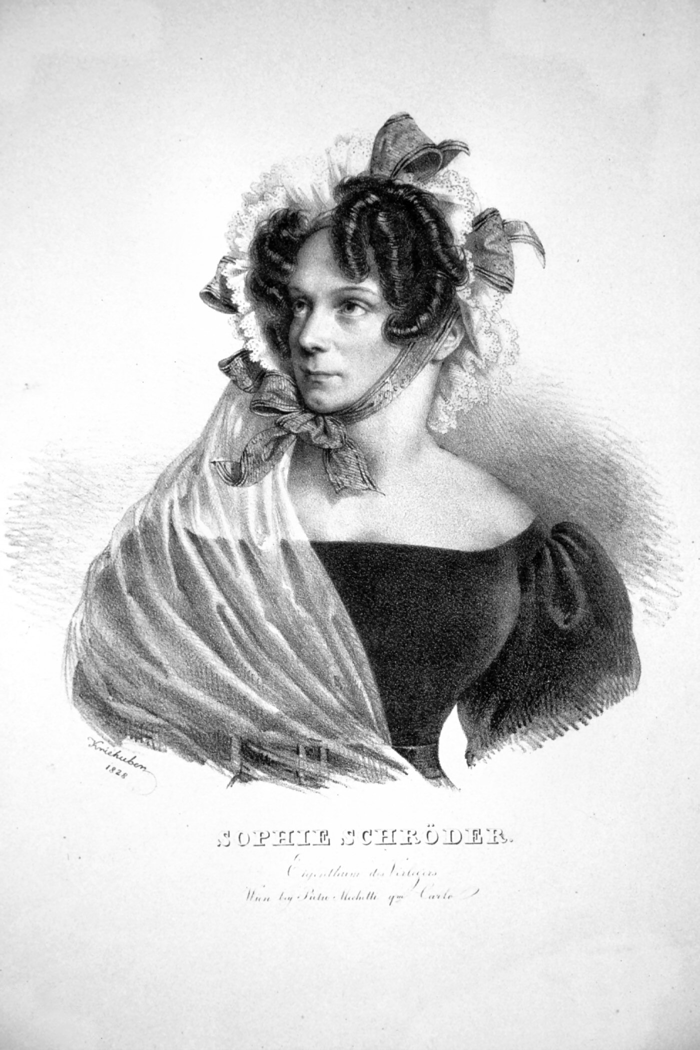 Sophie Schröder, Lithographie von Joseph Kriehuber